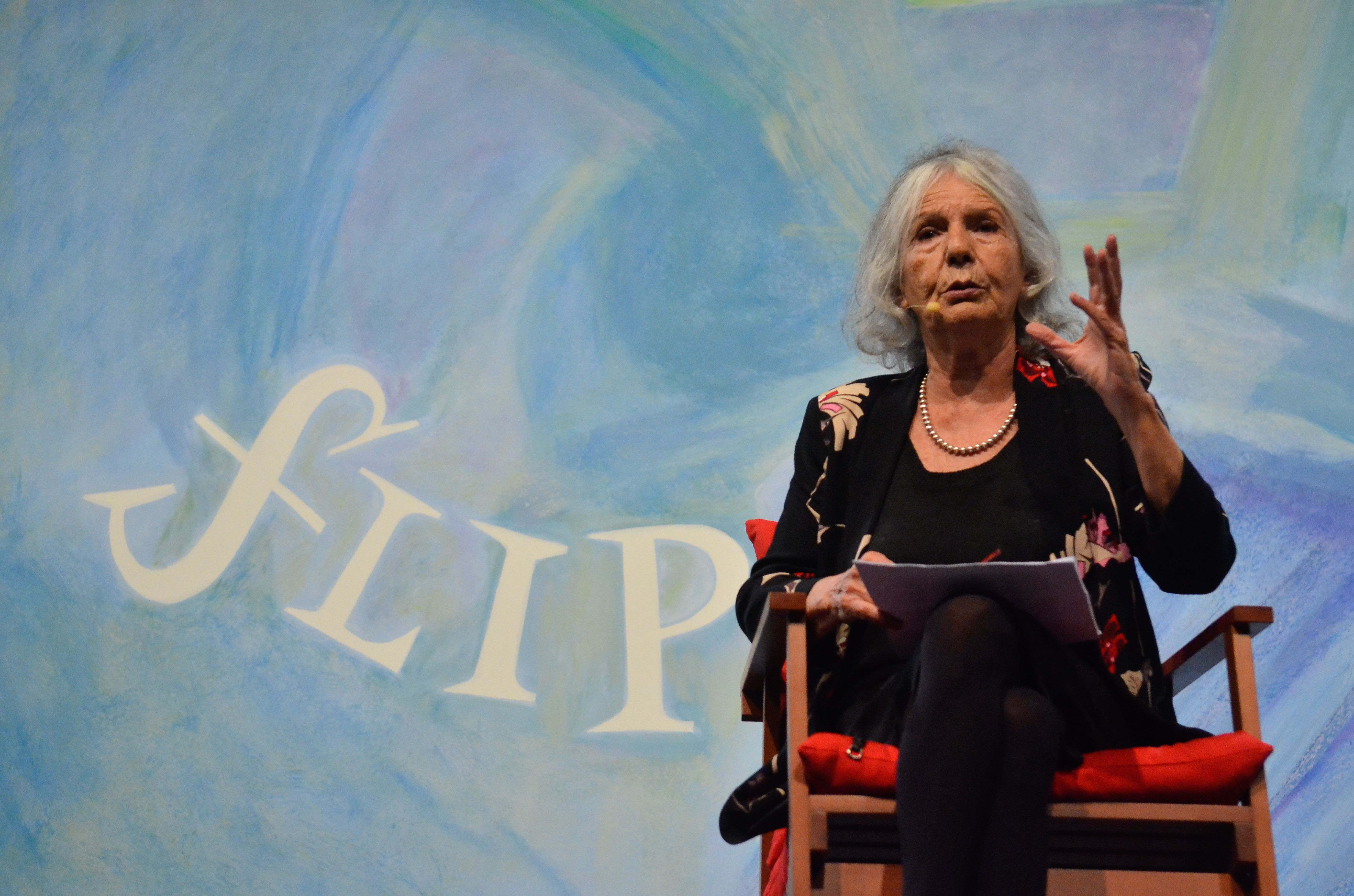 A professora Beatriz Sarlo participa da sessão de abertura da Flip 2015 - Festa Literária Internacional de Paraty, com a mesa literária: As Margens de Mário.